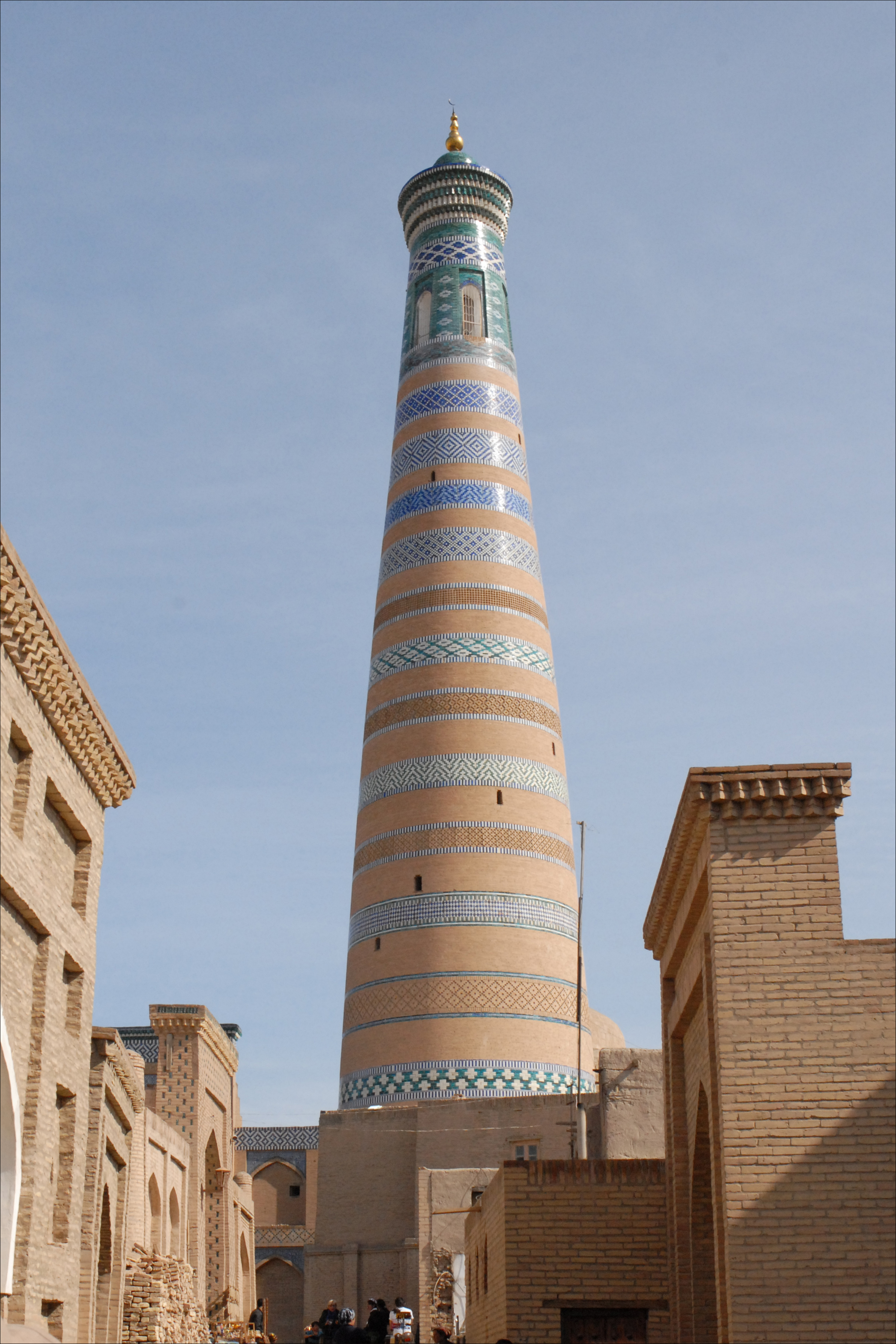 Le minaret Islam Khodja est le plus haut de Khiva. Il mesure 44,5 m et a été construit en 1910 par le Vizir Islam Khodja d'Isfandiar Khan.